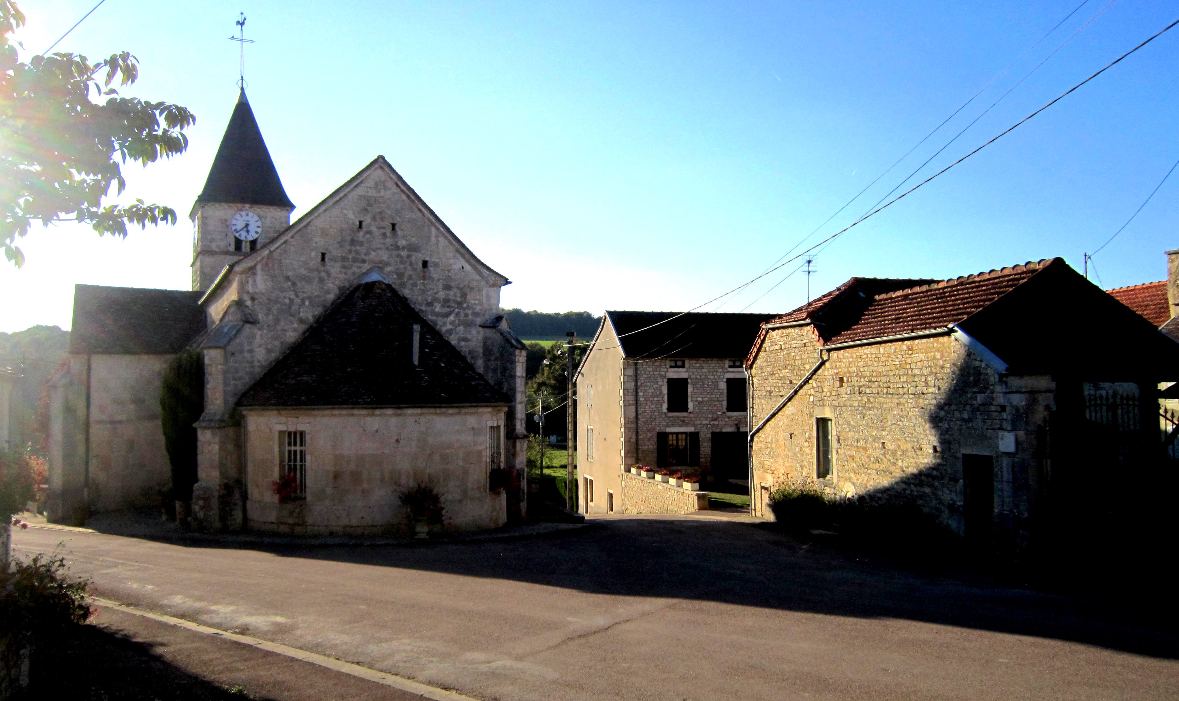 Faverolles-lès-Lucey (Côte-d'Or)